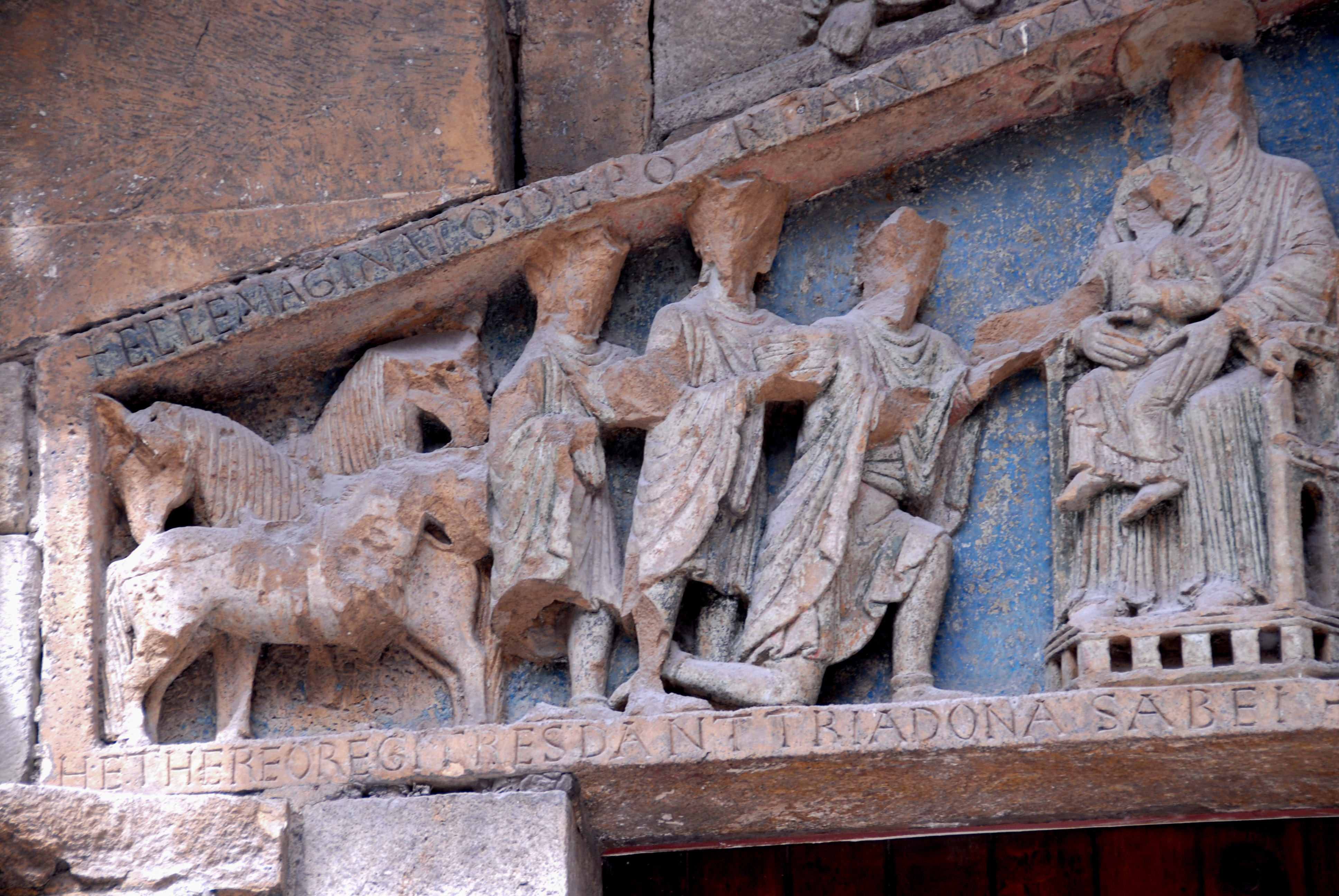 Notre-Dame du Port, Südportal, Sturz, linke Seite